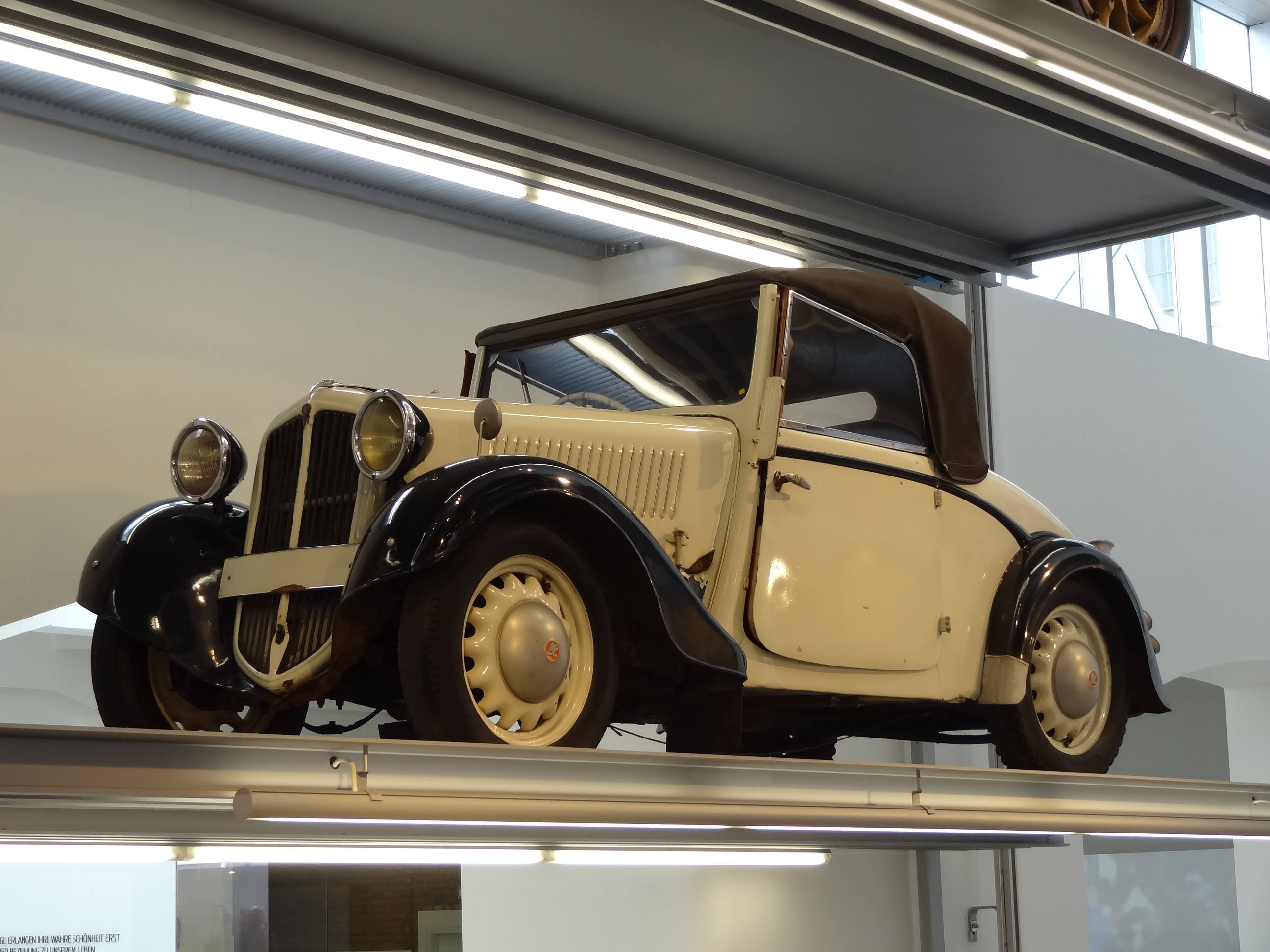 2014 Škoda Museum, Škoda Popular typ 418 1934